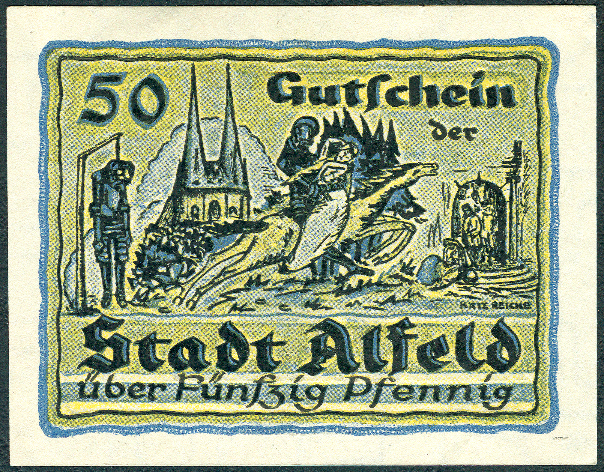 Notgeld Nummer 17858 (siehe die Rückseite) „Gutschein der Stadt Alfeld über fünfzig Pfennig“ Die mit dem Namen der Künstlerin Käte Reiche versehenen Darstellungen zeigen Motive aus der Alfelder Stadtsage vom Räuber Lippold, von links, den am Galgen erhängten Raubritter Lippold, im Hintergrund die evangelisch-lutherische Hauptkirche St. Nicolai, davor Lippold als reitender Ritter in Rüstung mit der geraubten Bürgermeisterstochter im Arm und schließlich ganz rechts Alfelder Bürger, am Portal des Rathauses, die der Bürgermeisterstochter am Blauen Stein zuhören, als sie diesem ihr Leid klagt.